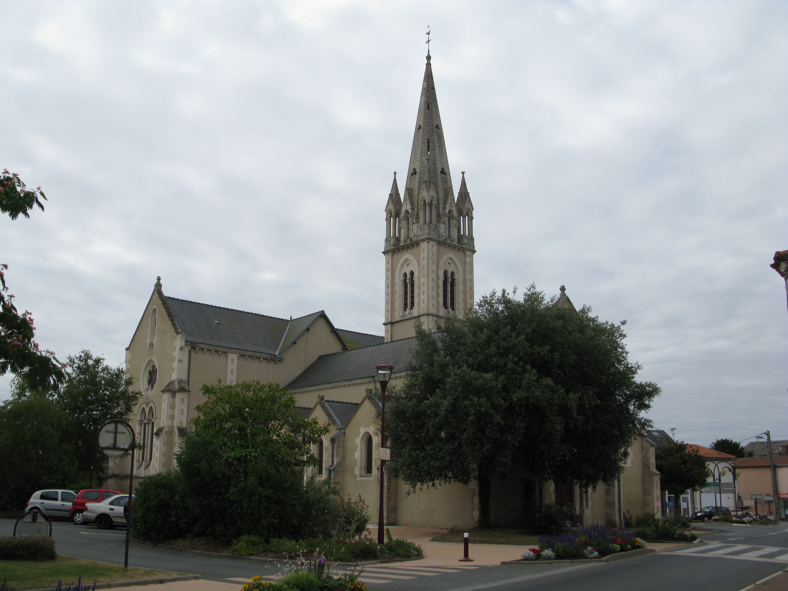 Église de La Ferrière